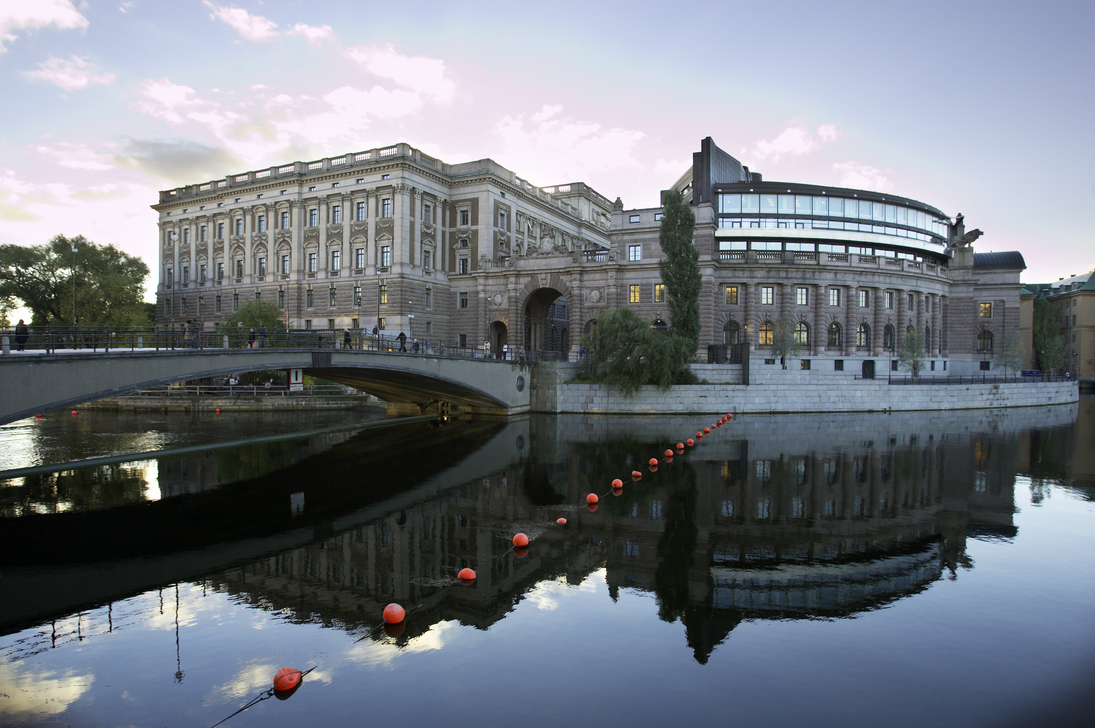 Riksdagshuset i Stockholm